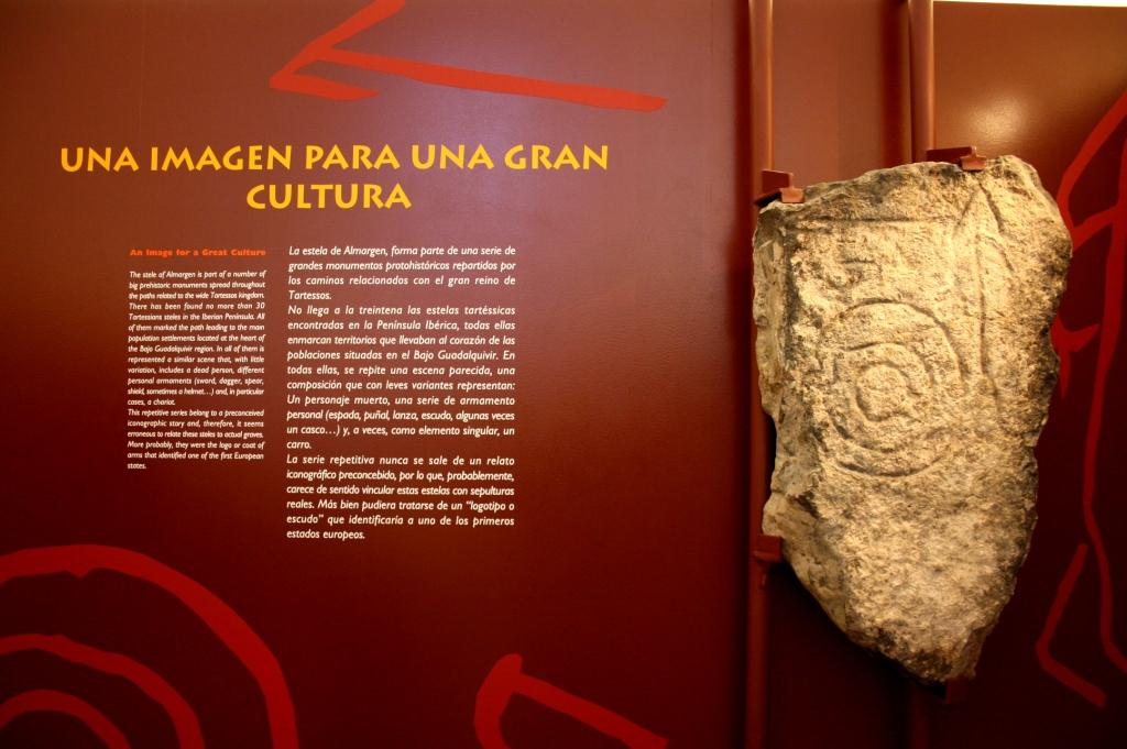 Fotografía realizada en el Centro de Interpretación Tartesos de Almargen